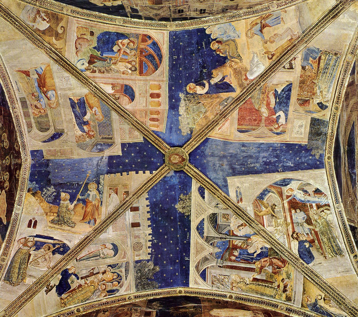 The-ceiling-of-the-martial-chapel-1344-46,_Дворец_Пап_в_Авиньоне